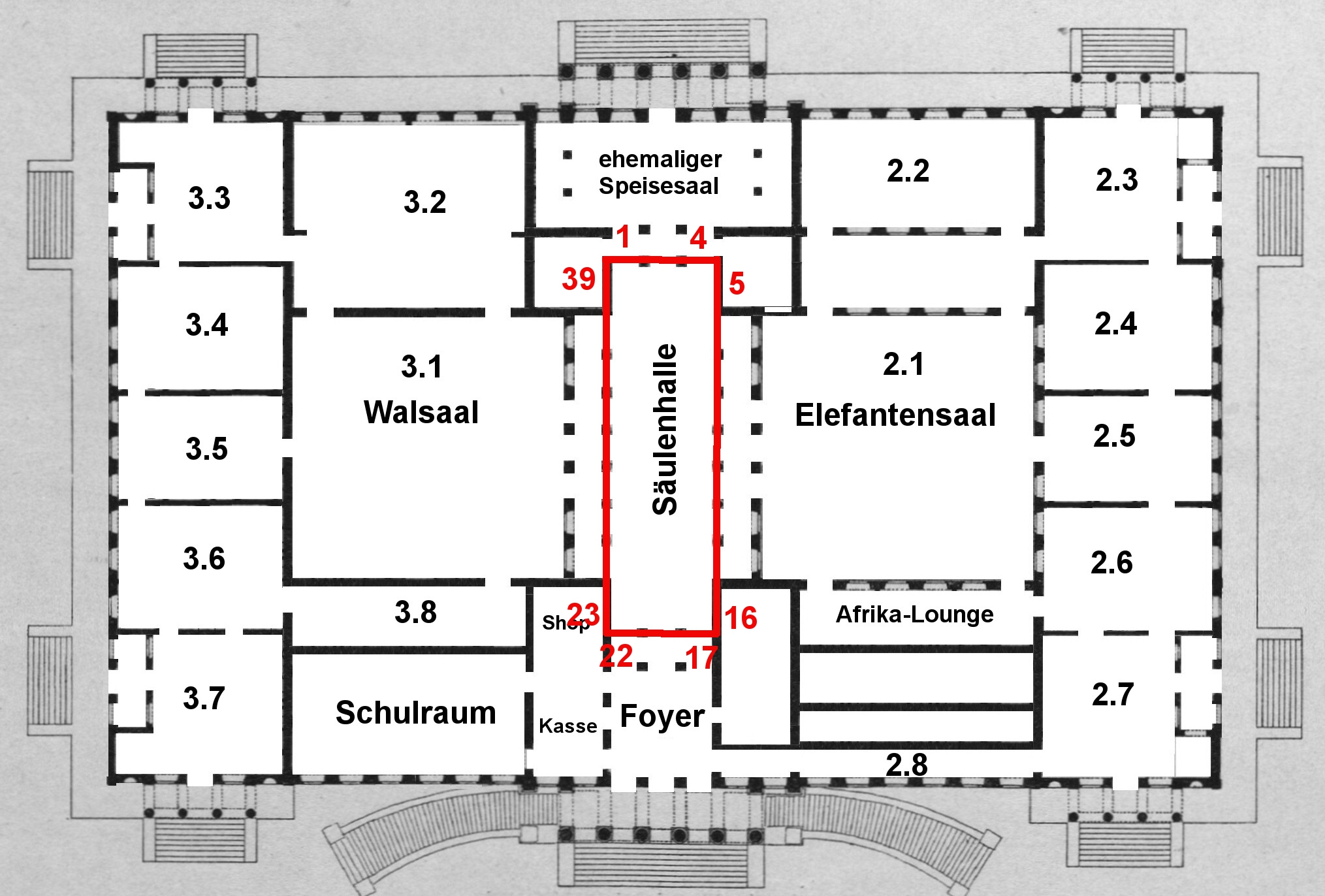 Grundriss des Erdgeschosses von Schloss Rosenstein in Stuttgart, 2014. – Rote Linie: Lage des Vierjahreszeitenfrieses Rote Zahlen: Nummern der Friesszenen an den Raumecken.